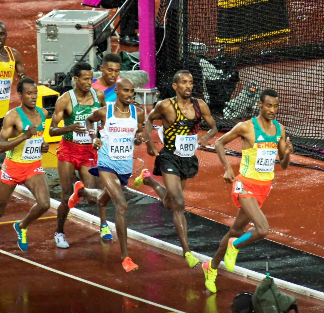 d5_5 5000m abdi farah